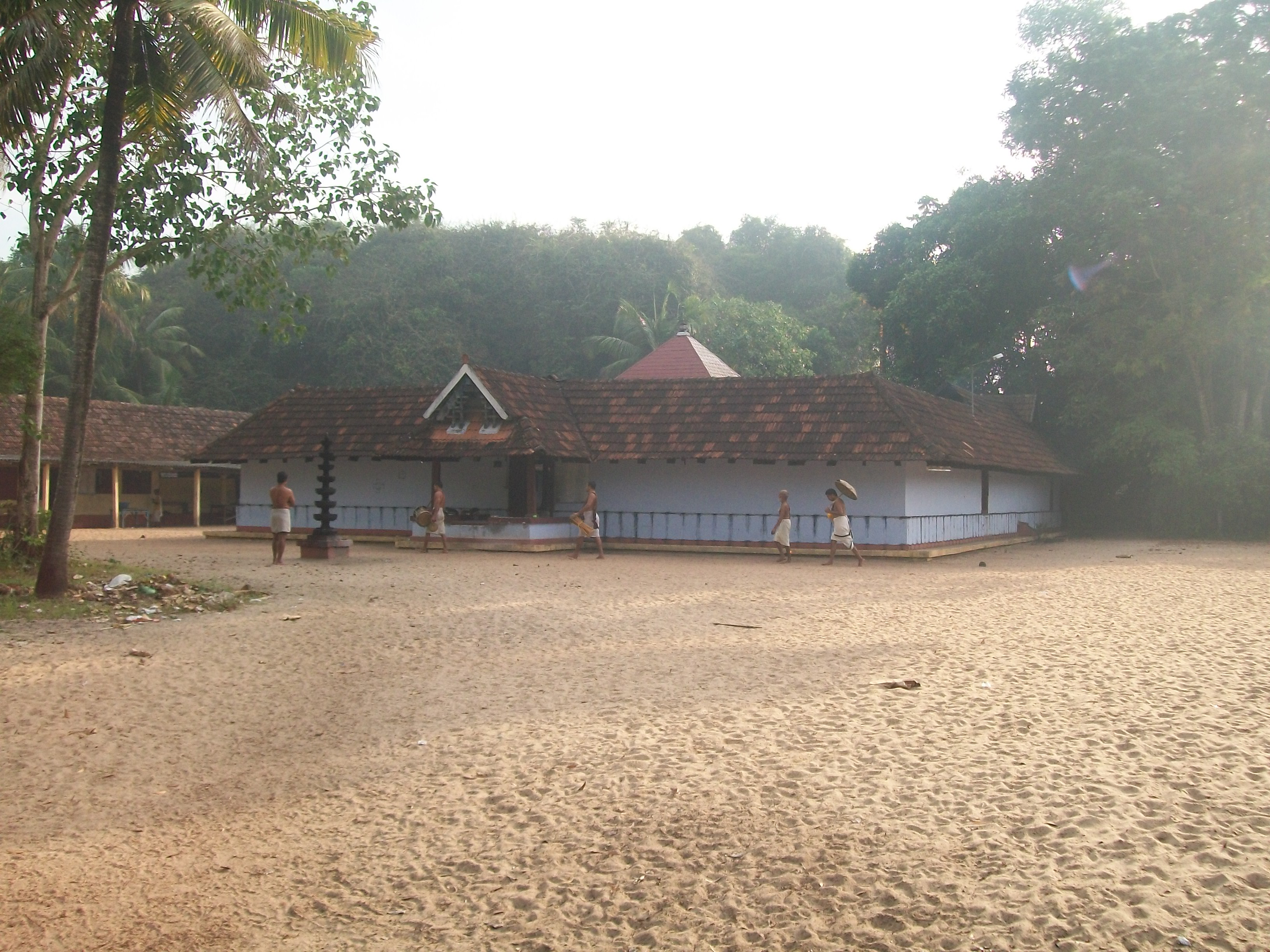 വയലാർ ഗ്രാമത്തിലെ പ്രസിദ്ധക്ഷേത്രം